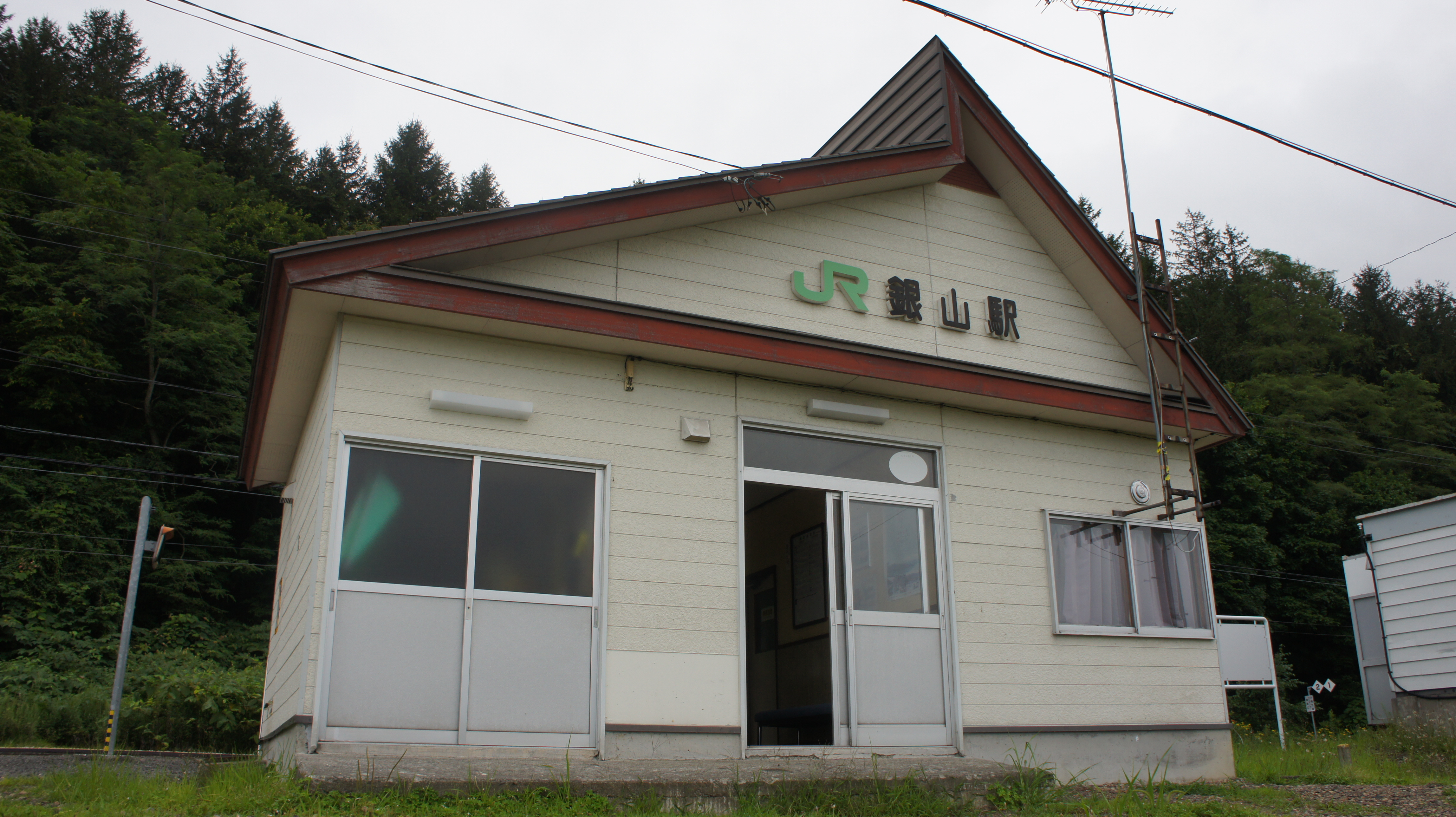 JR函館本線・銀山駅の駅舎